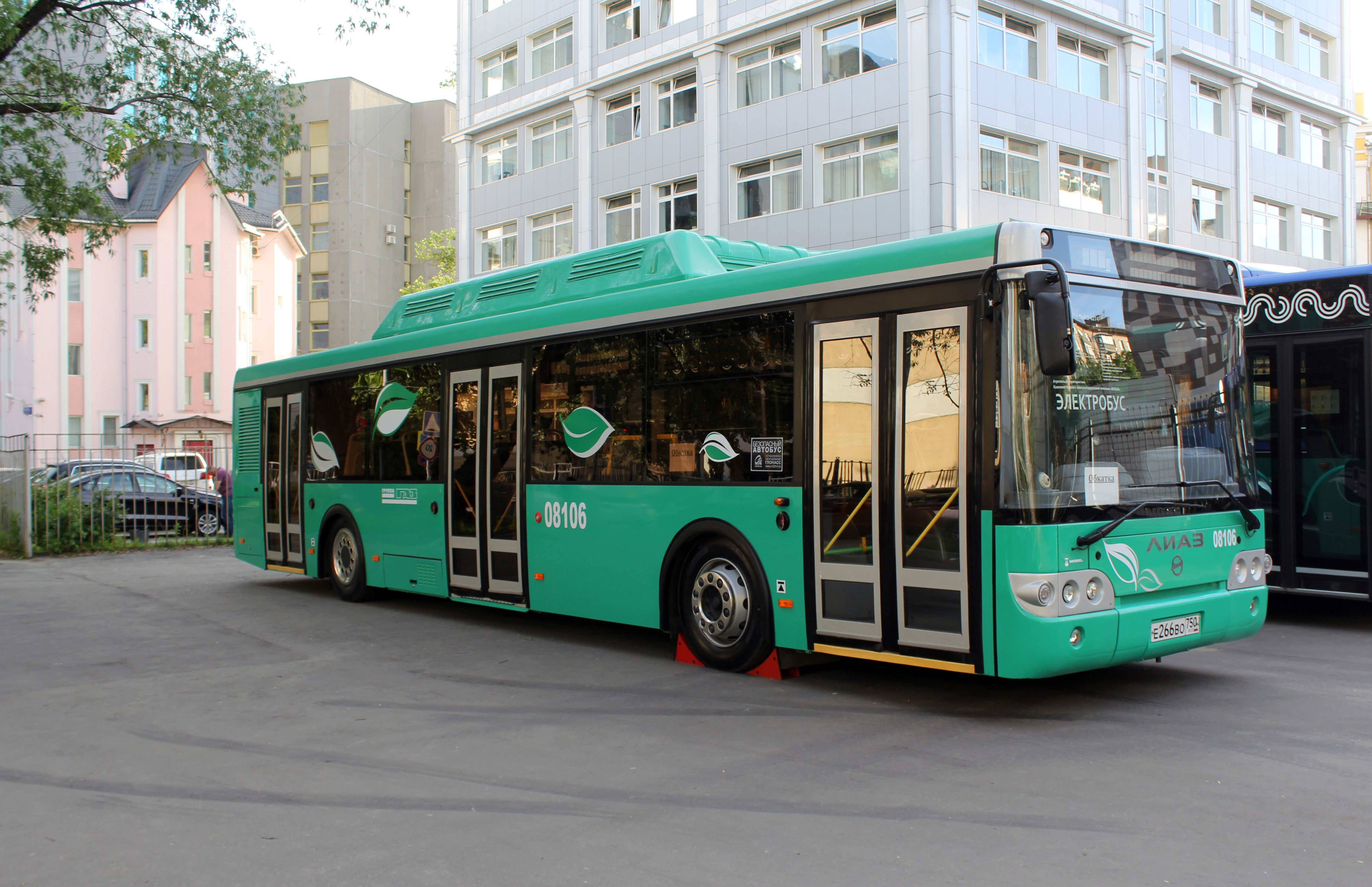 ЛиАЗ-6274 в период обкатки в Москве